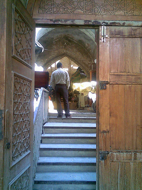 Looking out of Mustansiriya, Baghdad